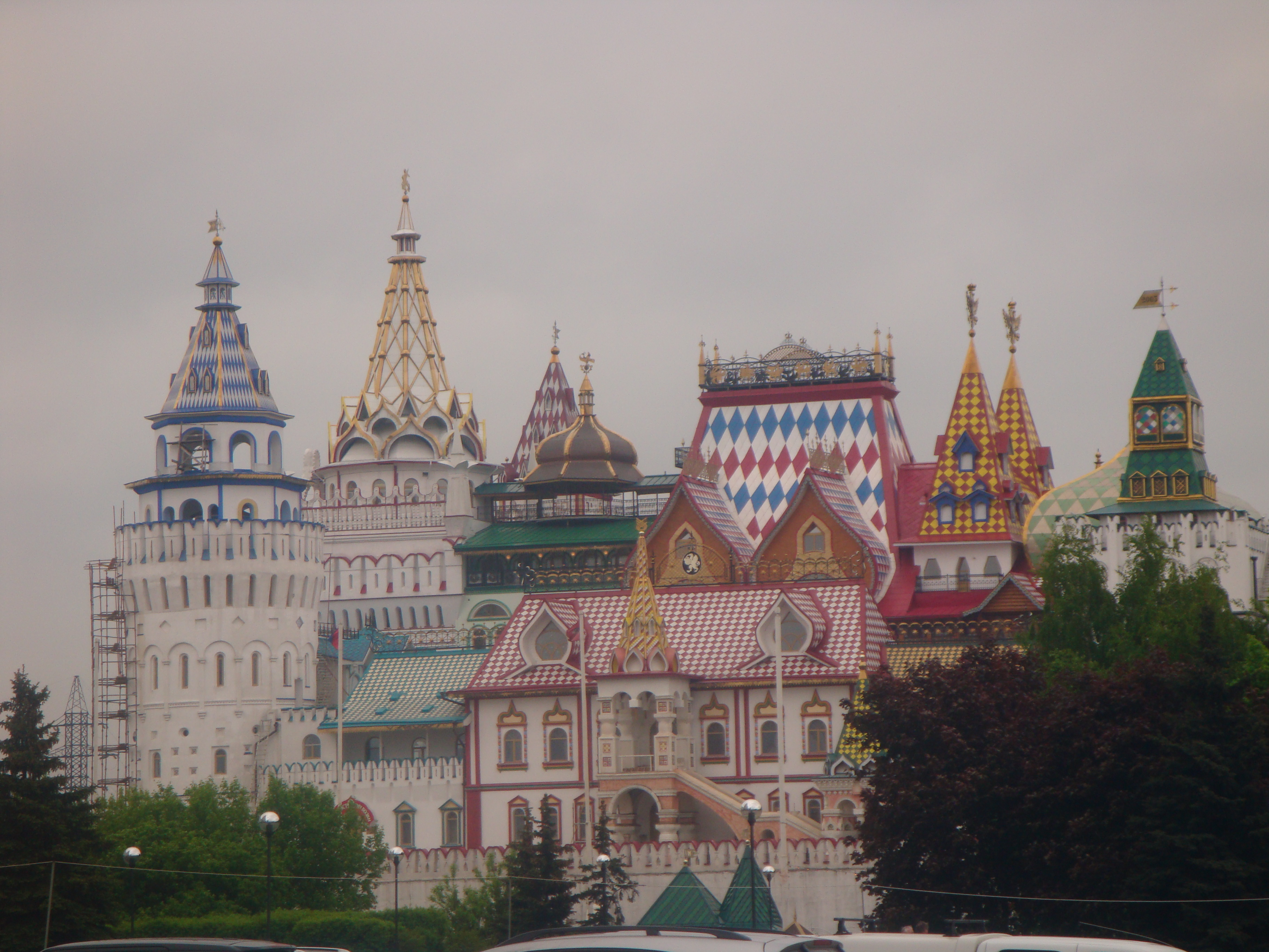 Измайловский вернисаж